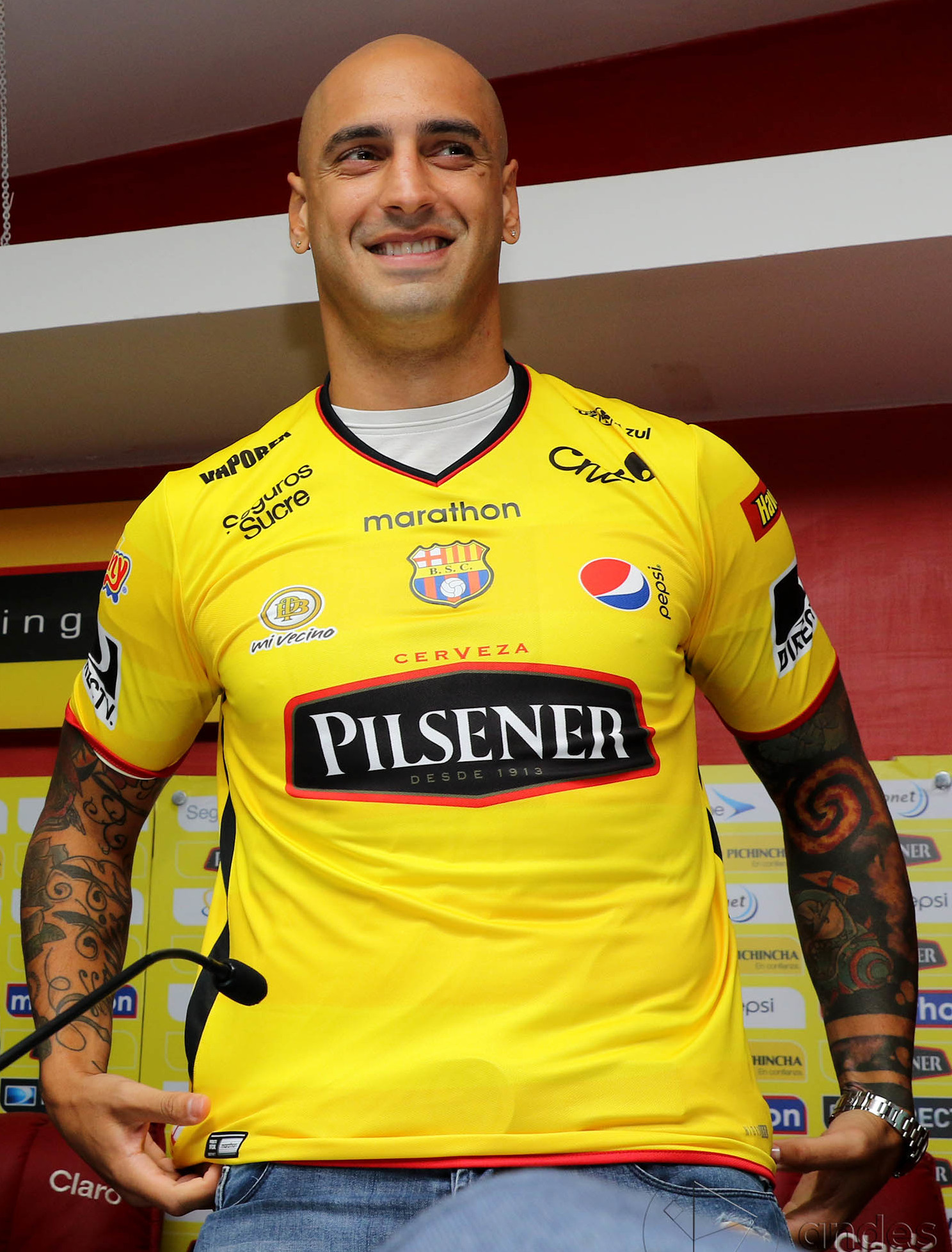 Guayaquil, jueves 16 de marzo del 2017 (Andes).-El delantero argentino Ariel Nahuelpan fue presentado como refuerzo de Barcelona de Ecuador. Foto:Andes/César Muñoz